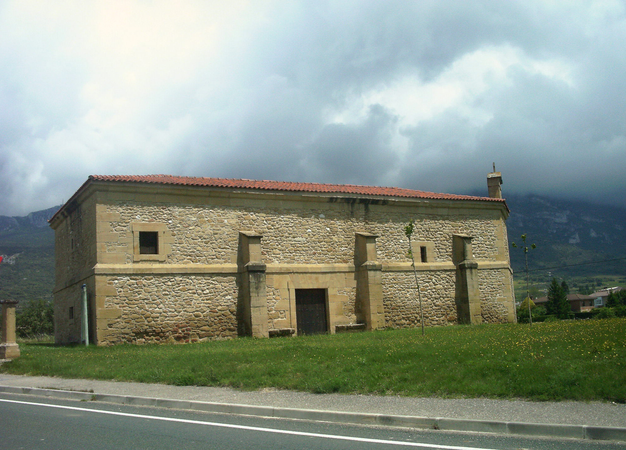 Samaniegoko baseliza